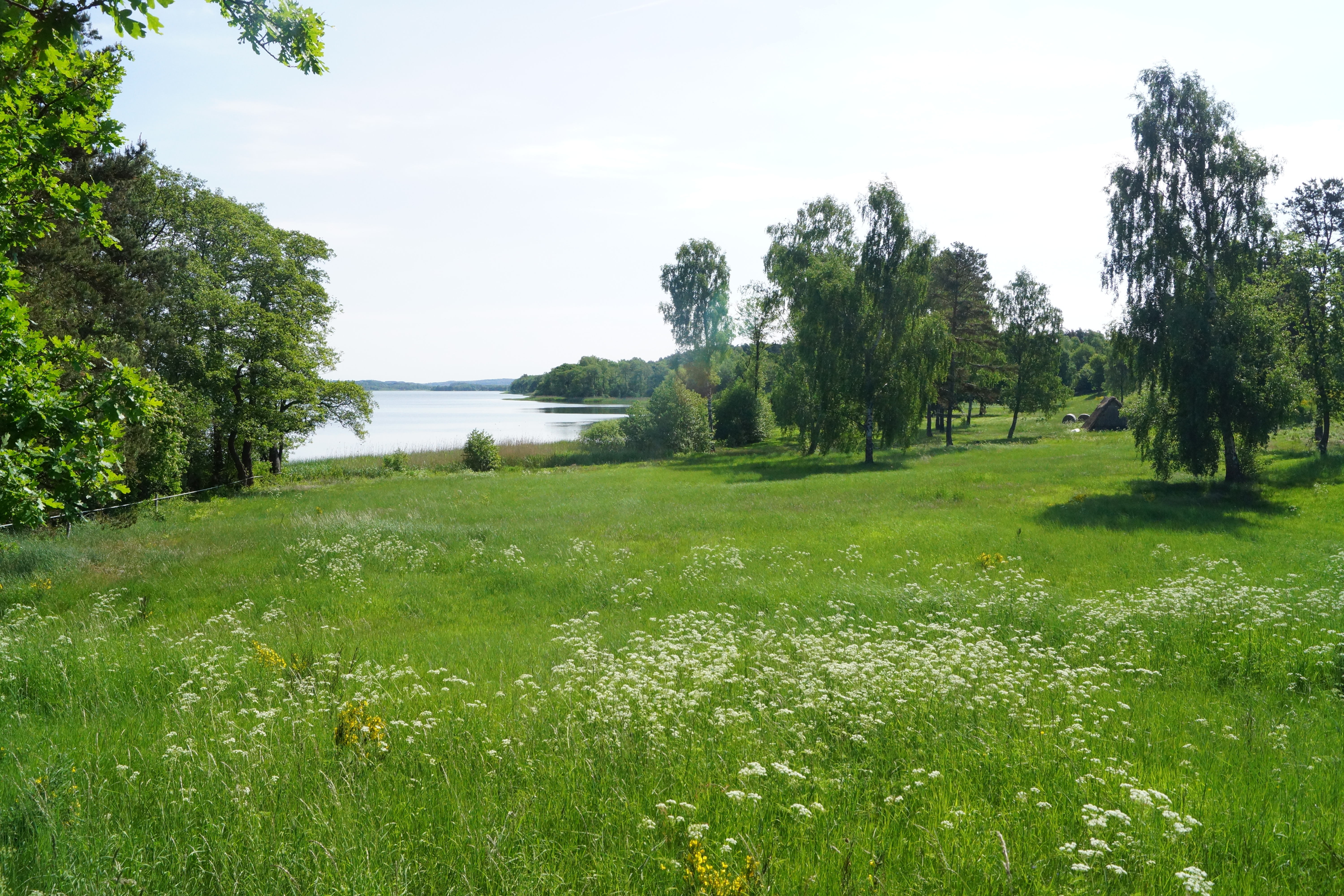 Stubbe Sø.